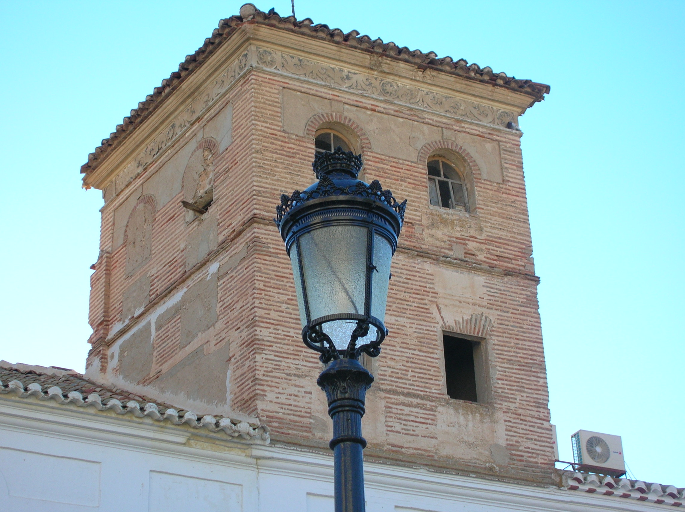 TORRE PALACIO